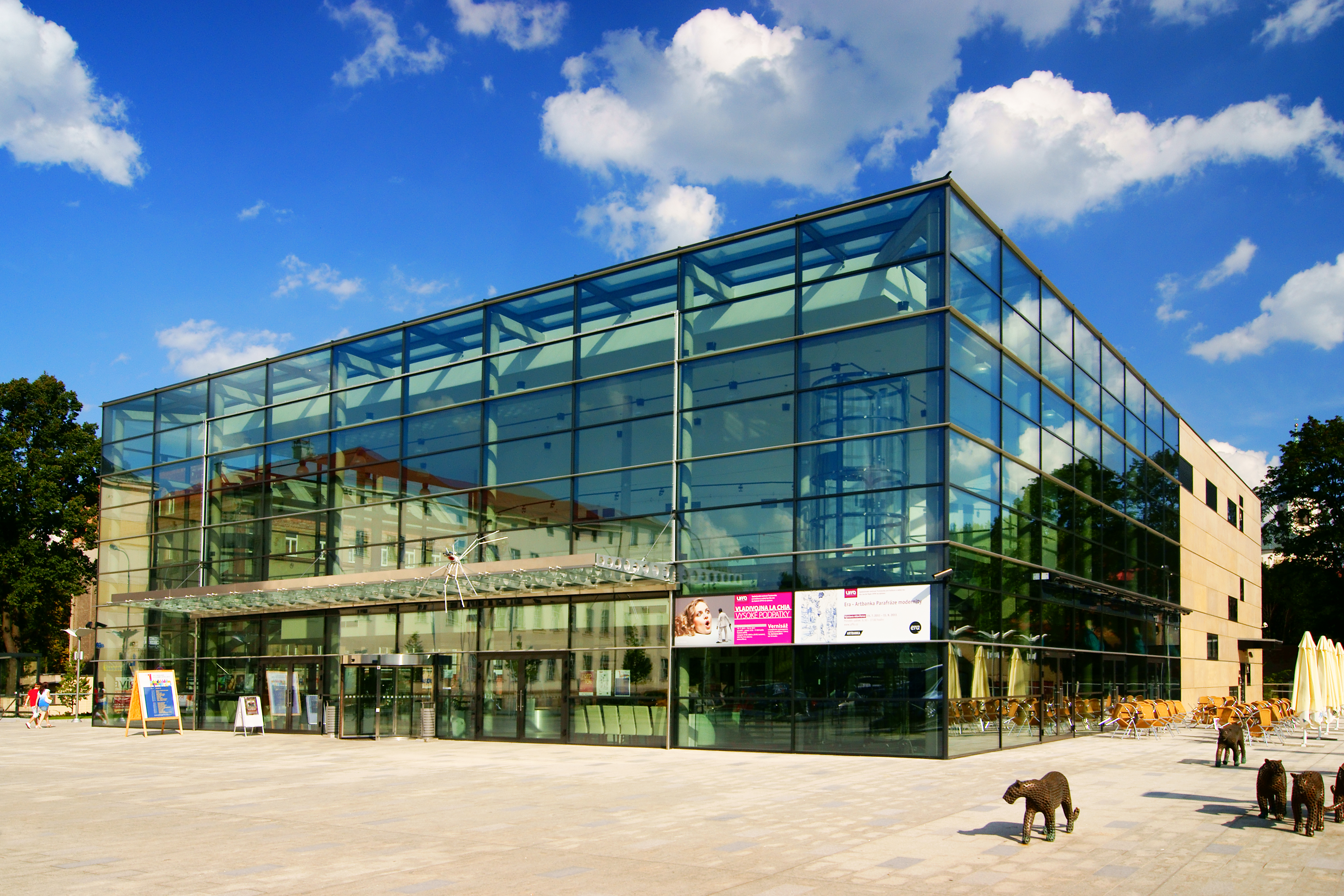 Společenské centrum UFFO na náměstí Republiky v Trutnově.